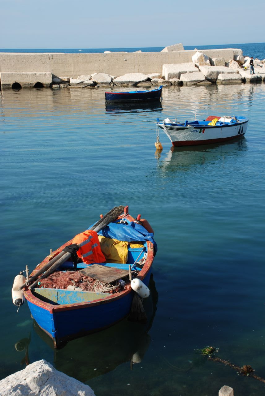 Autore:Dantes102 Fonte:Flickr Licenza:it:Creative commons